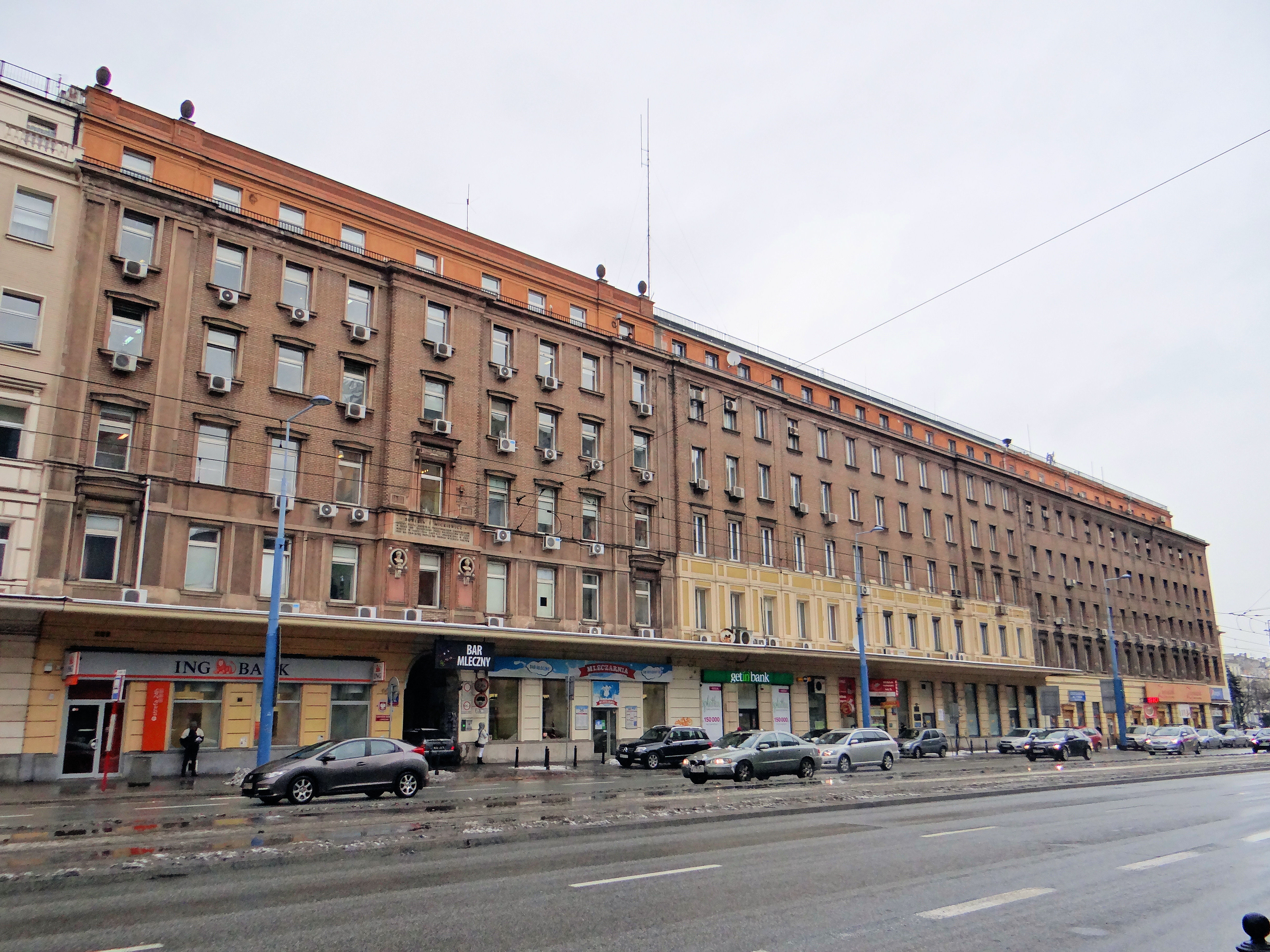 Budyek przy al Jerozolimskich 32, 30